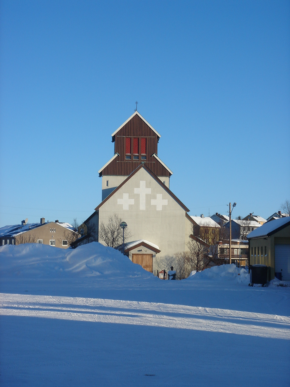 Kirkenes kirke/Kirkenes Church